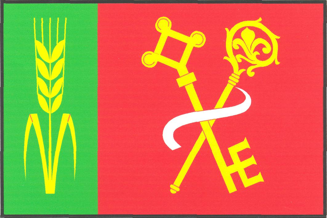 Vlajka obce Jílovice (okres Hradec Králové)